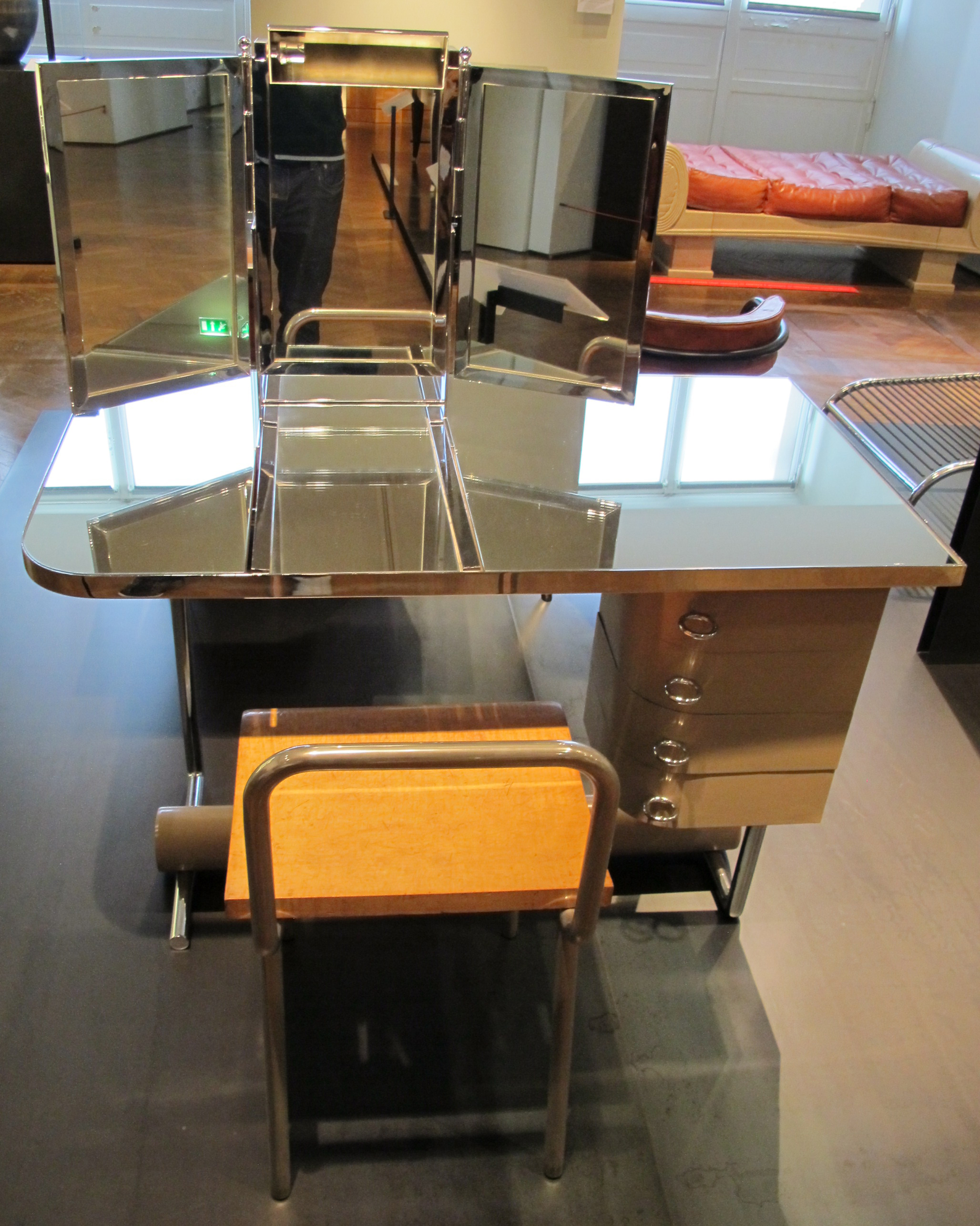 René herbst, coiffeuse e sedia della principessa aga khan, 1932